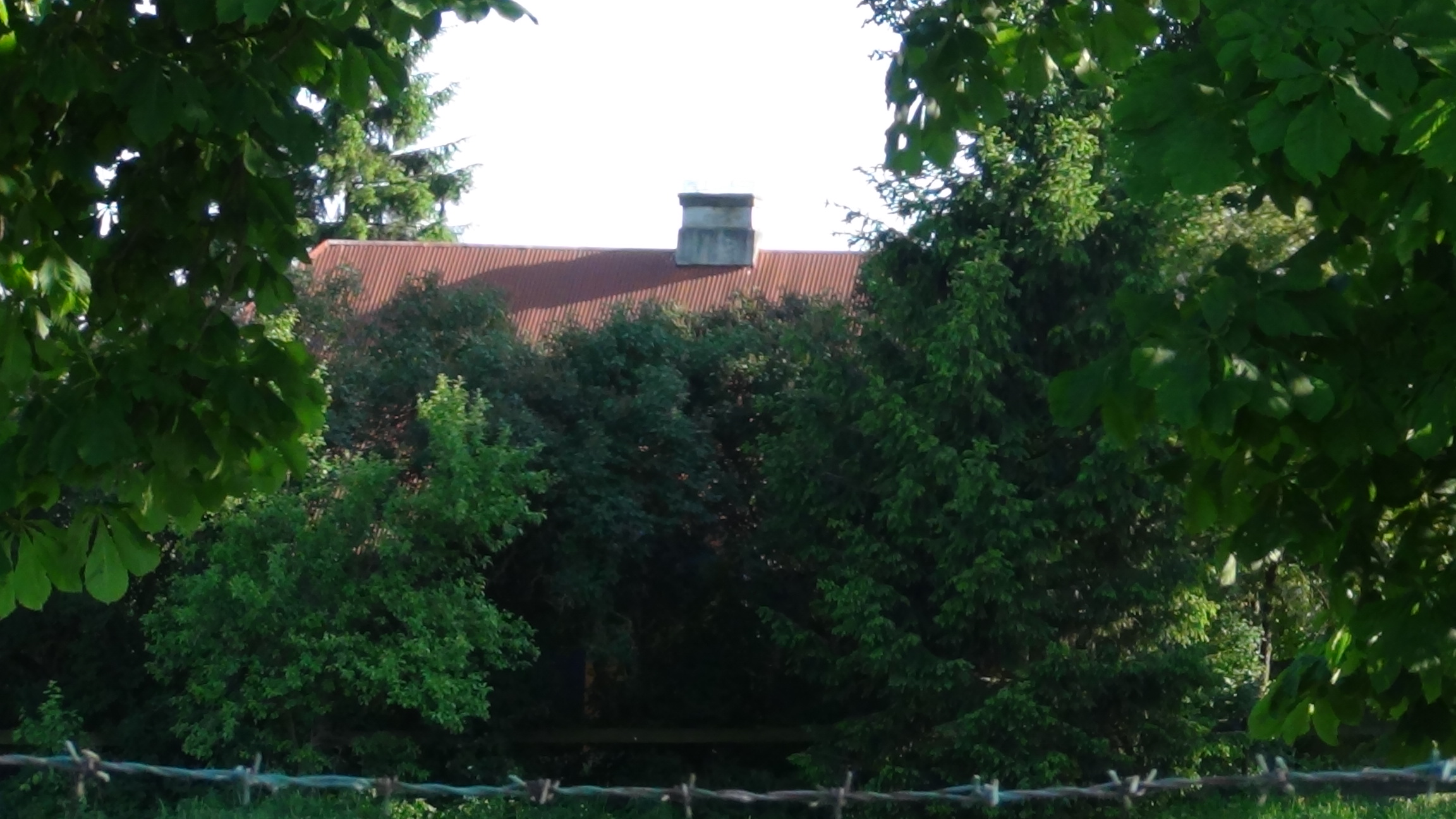 Przęczki - widok dworu z oddali